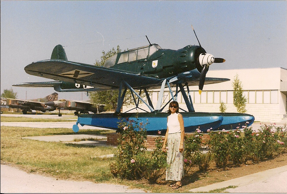 Arado AR196 Seeaufklärer in der Ausstellung des bulgarischen Luftwaffen Museums auf dem Flughafen in Plovdiv. Das Flugzeug ist der ganze Stolz der Direktorin, die im Vordergrund zu sehen ist. Zuvor wurde dieses Seeflugzeug im Marinemusuem in Varna ausgestellt. Aus Platzmangel dann aber in das Luftwaffenmuseum umgesetzt.